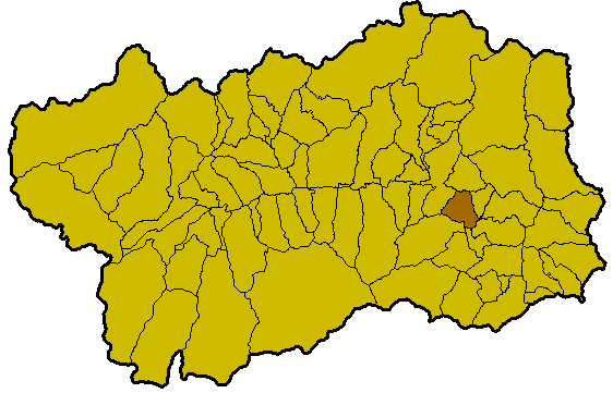 Montjovet